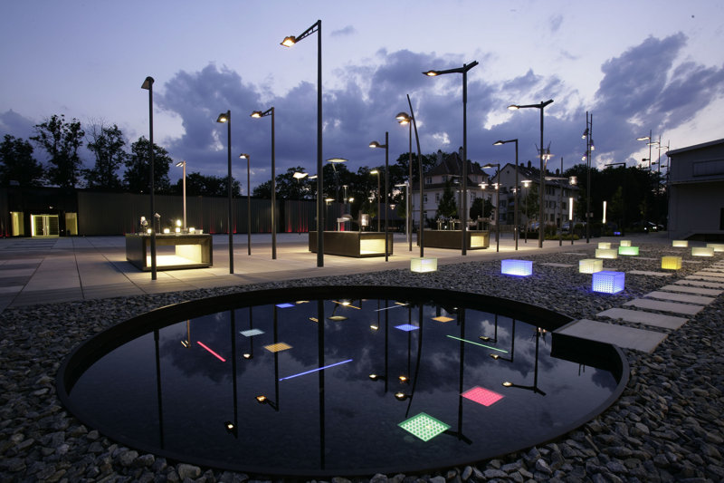 Hauptsitz der Hess AG: Schauplatz am Standort in Villingen-Schwenningen